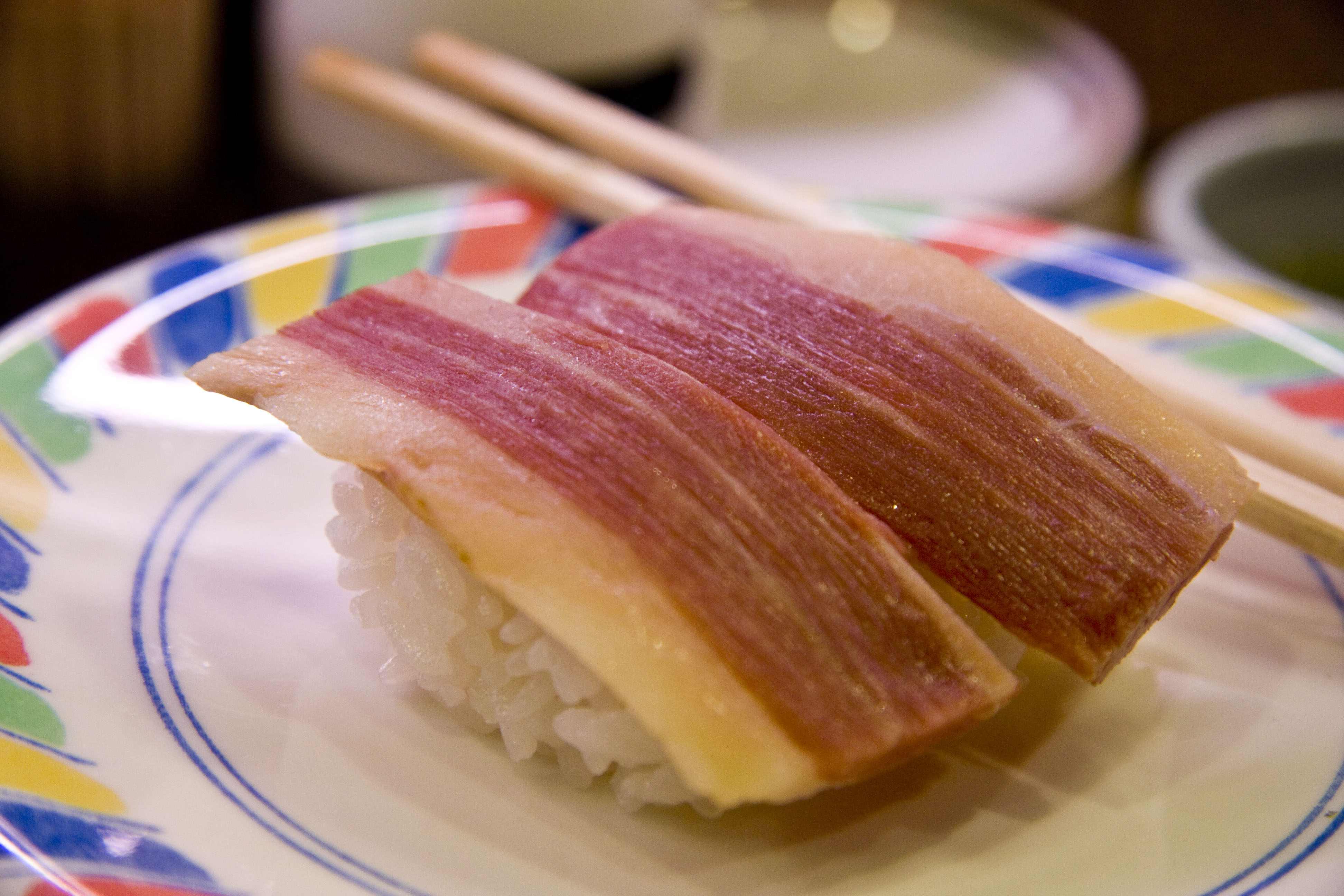 Bacon nigirizushi